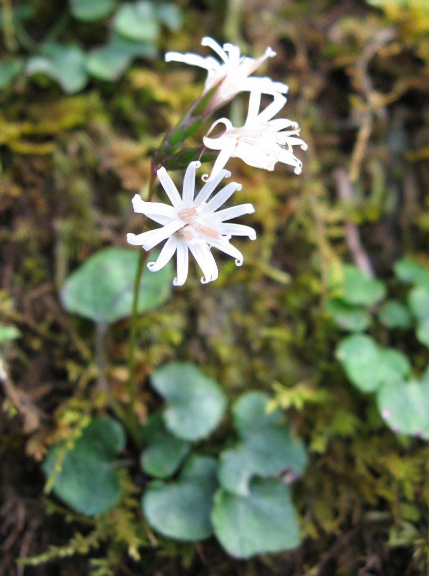 キッコウハグマ (学名:Ainsliaea apiculata) 撮影地：神奈川県足柄上郡山北町